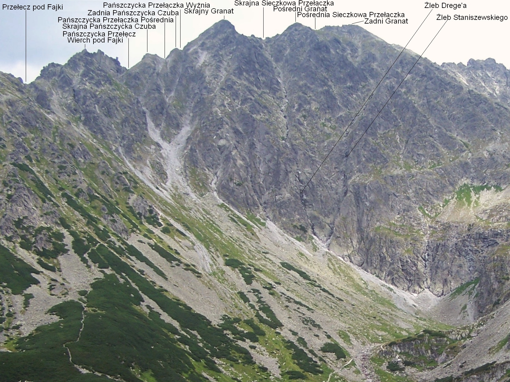 Widok z podejścia na Karb